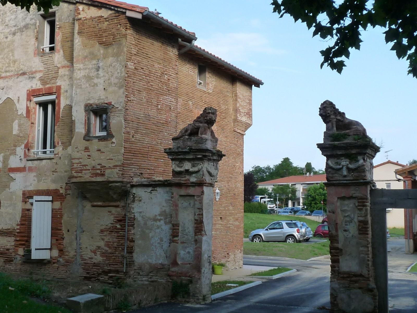 Lions de l'entrée de l'ancien château (domaine loti), Sainte-Foy-d'Aigrefeuille, Haute-Garonne, France